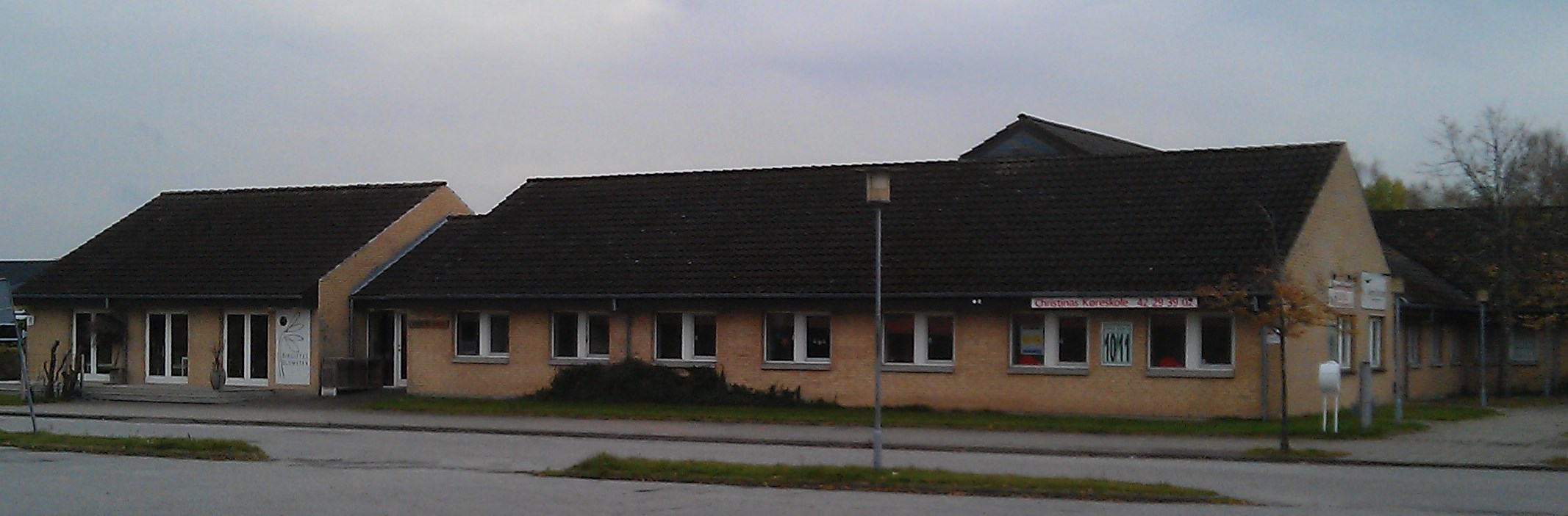 Gistrup Posthus fandtes i bygningens venstre (østlige) del